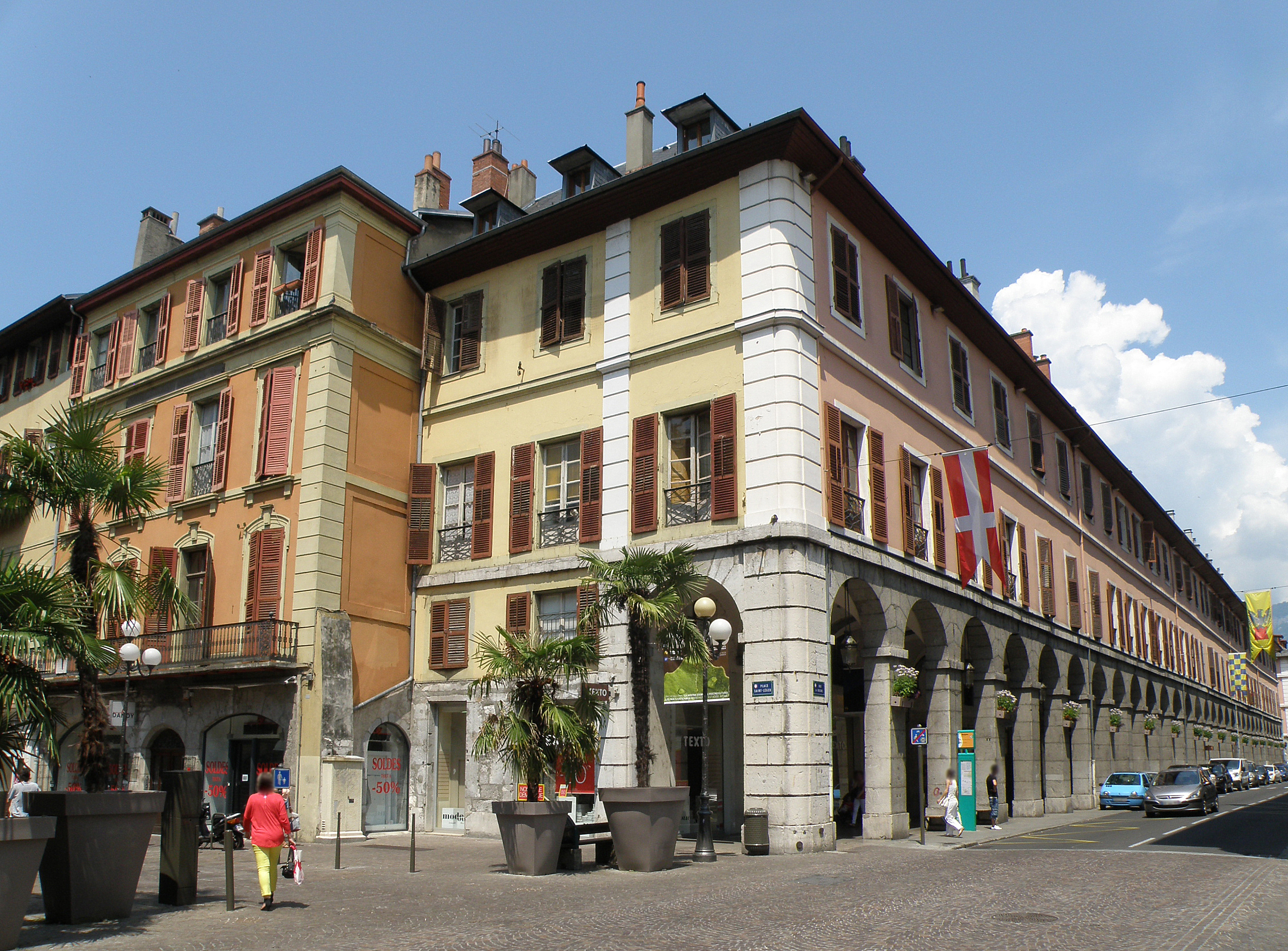 Chambéry, ville et préfecture du département de la Savoie (région Rhône-Alpes, France). Rue de Boigne (à droite, bordée de galeries à arcades)), à l'endroit où elle croise la place Saint-Léger (à gauche), dans le centre-ville.